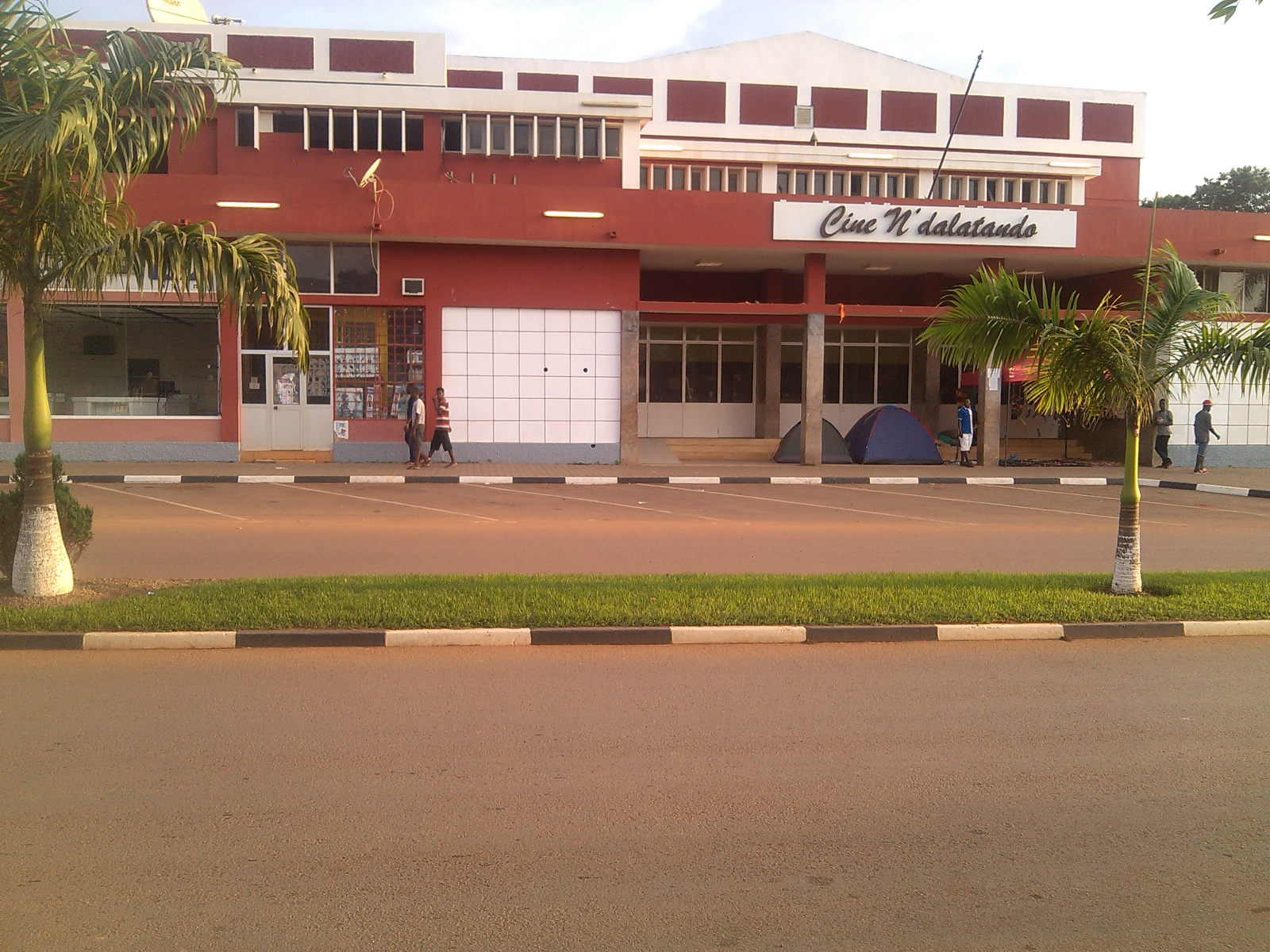 Imagem do cine N'dalatando localizado na província do Kwanza Norte município de Cazengo....